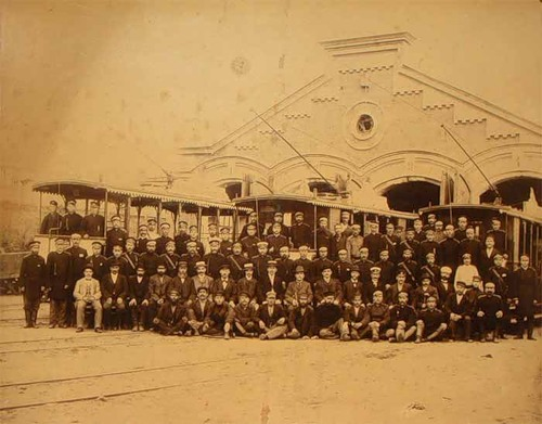 Працівники кіровоградського трамвайного депо